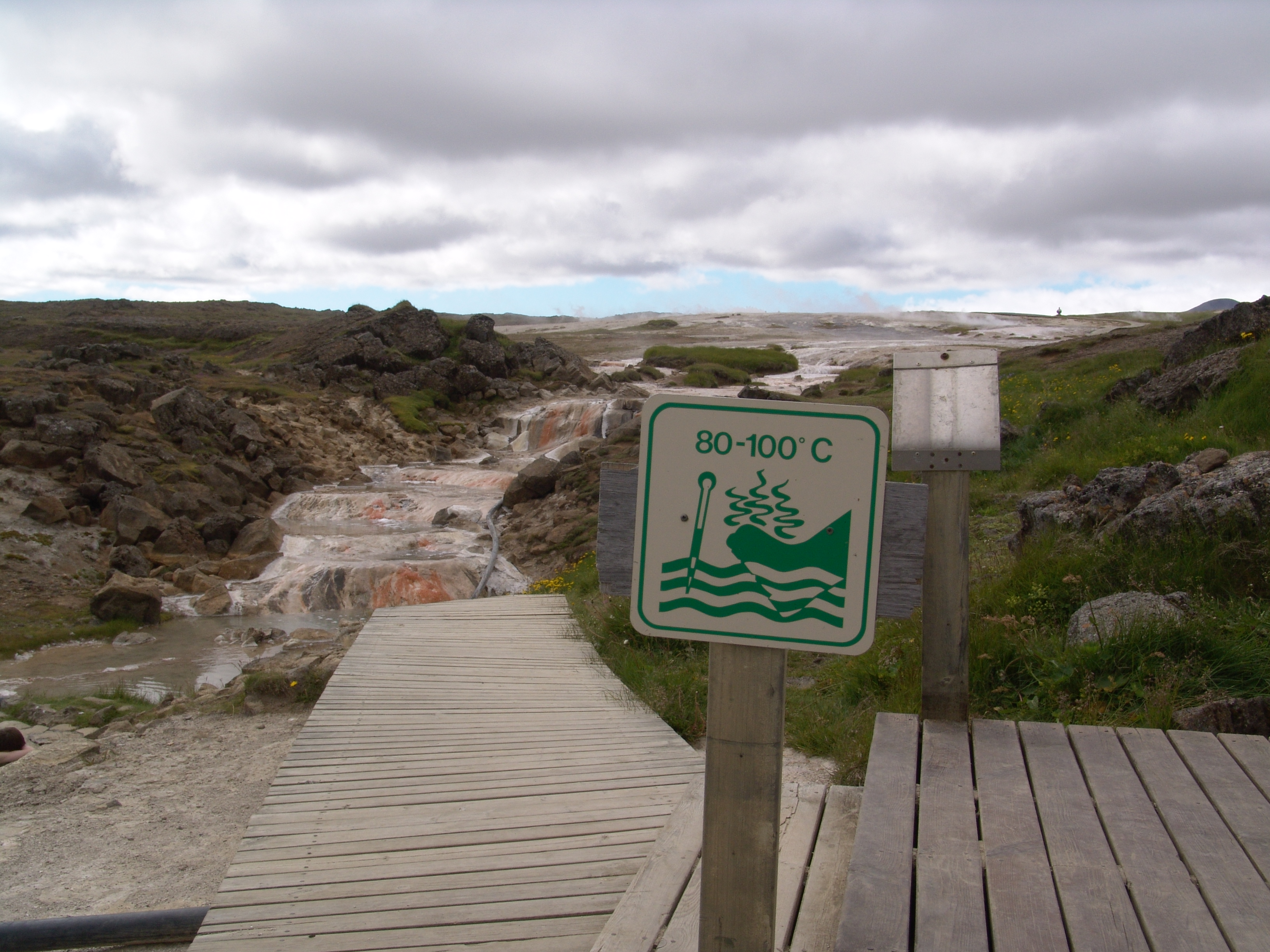 Heise Quelle.